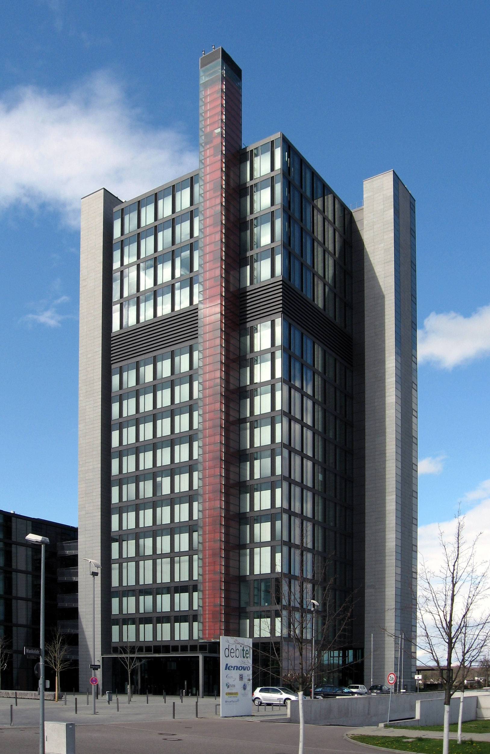 Gebäude STEP 6 im Stuttgarter Engineering Park in Stuttgart-Vaihingen, Hauptsitz von Debitel und Lenovo Deutschland